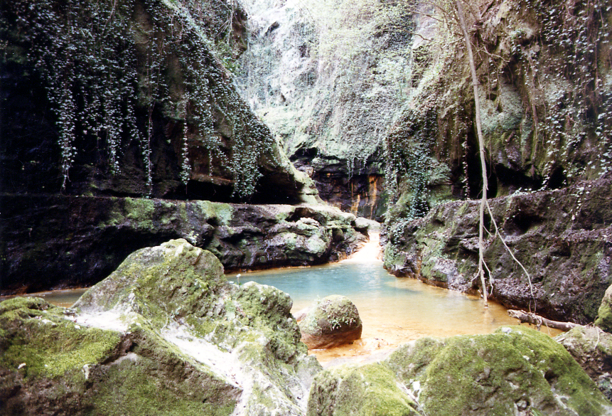 Le gole dell'Infernaccio, tra Celleno e Grotte Santo Stefano